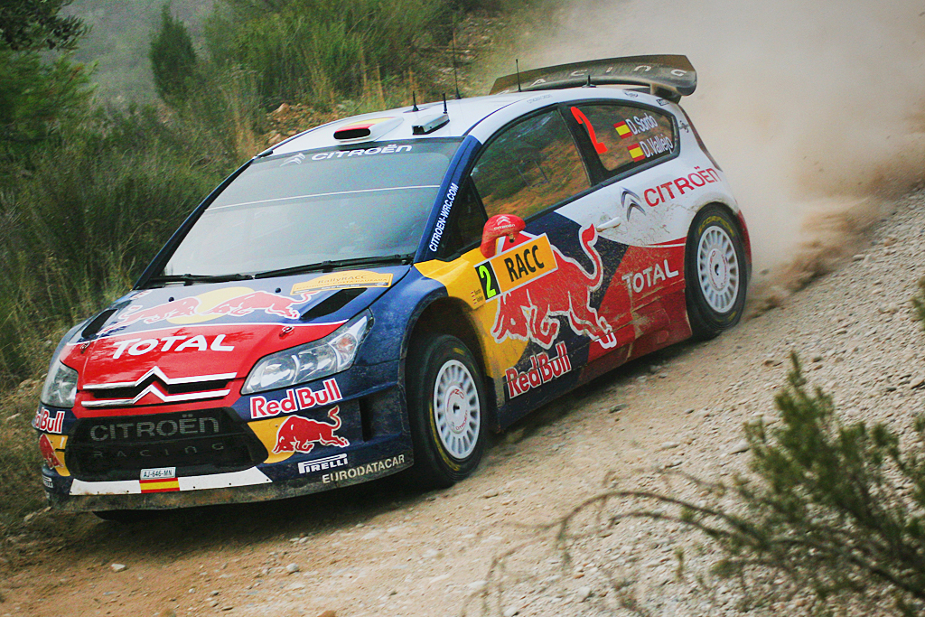 Sordo-Vallejo Rally Catalunya 2010